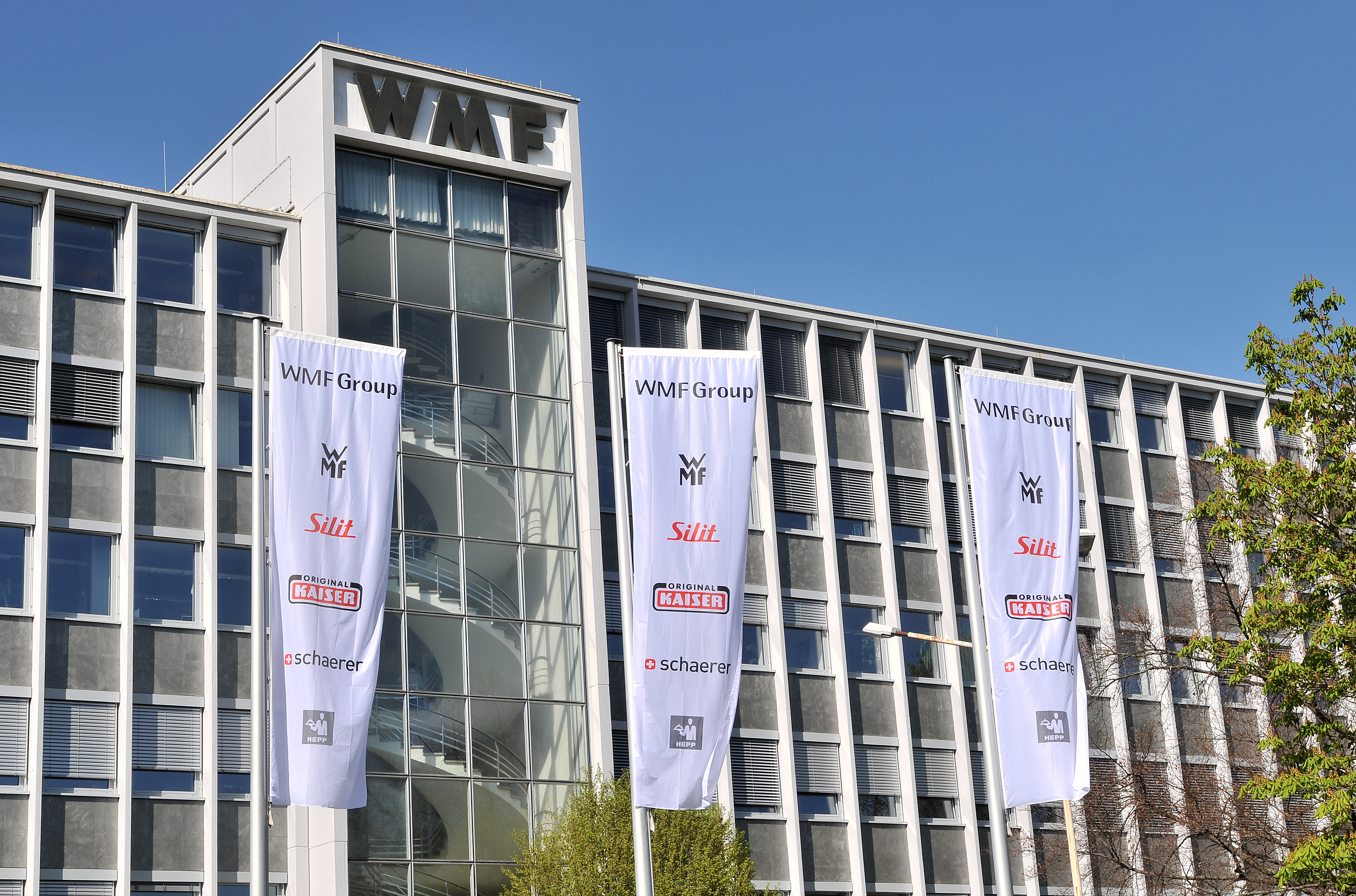 WMF_Group_neue_Fahnen